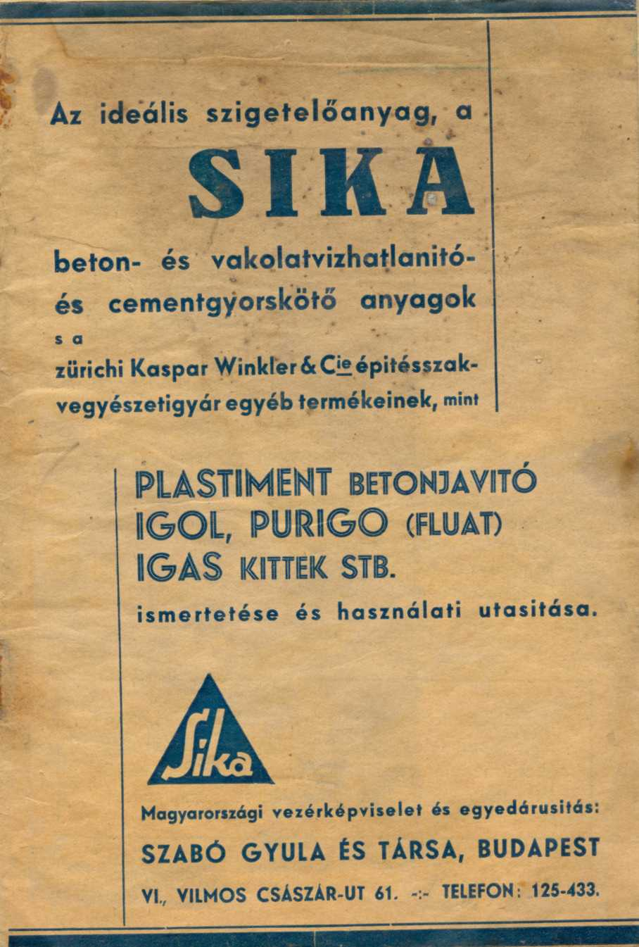 Sika relikvia az 1930as évekből